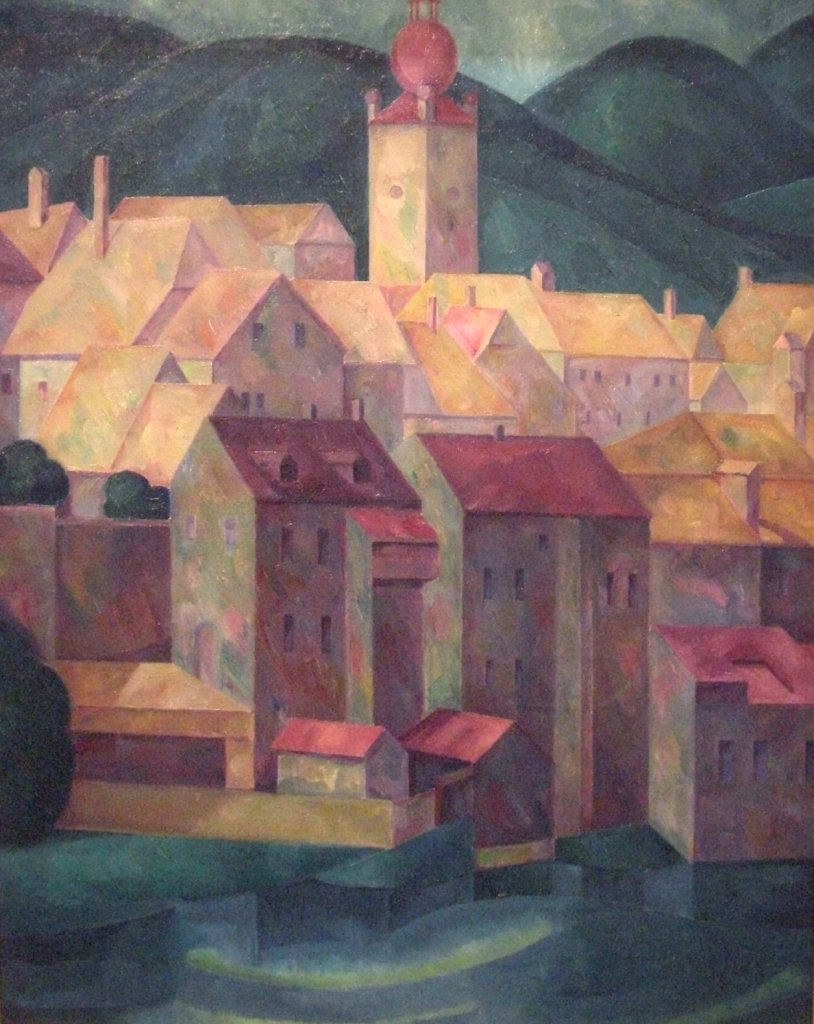 Waidhofen an der Ybbs